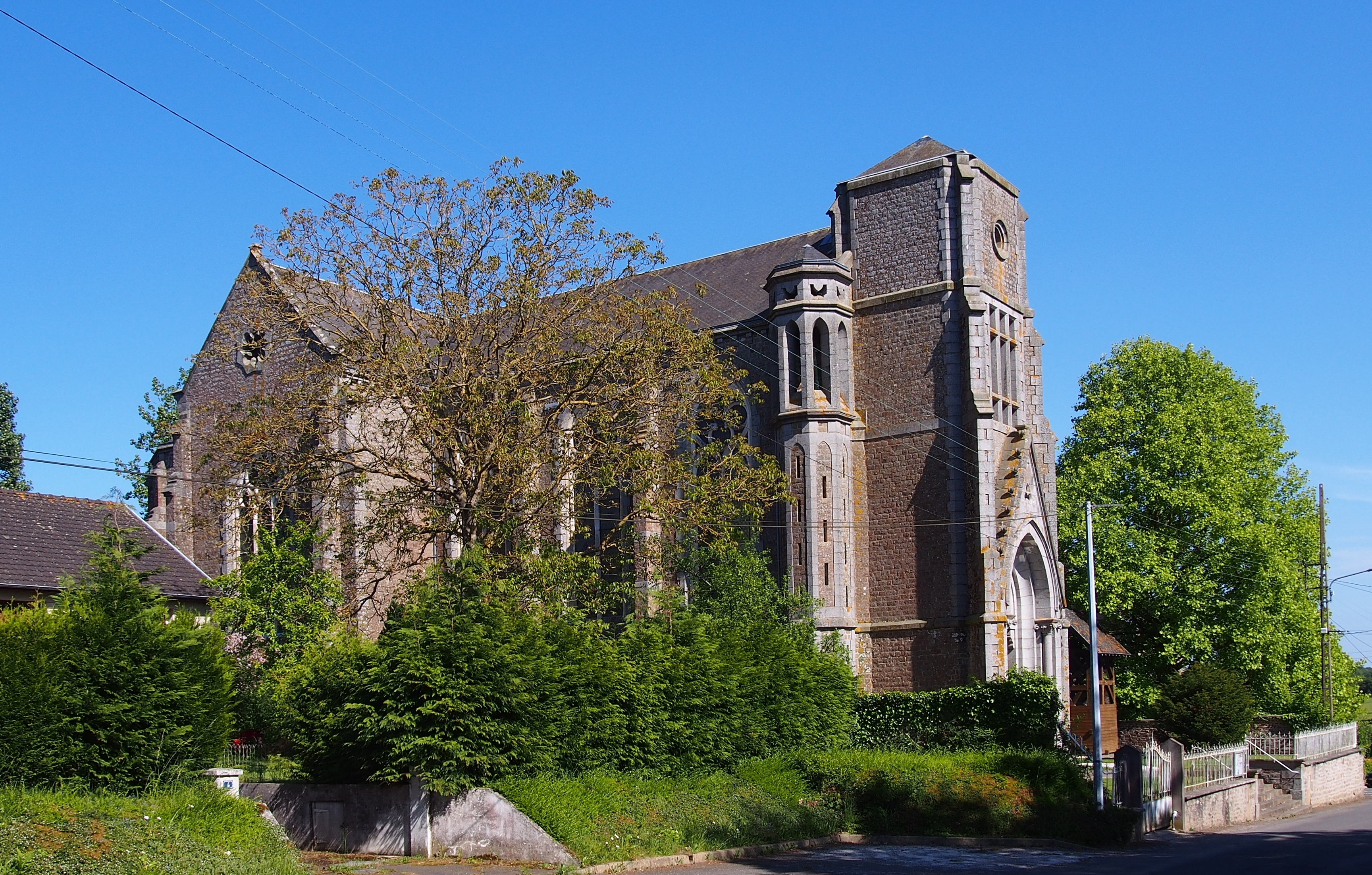 La Selle-la-Forge (Normandie, France). L'église Saint-Sauveur.